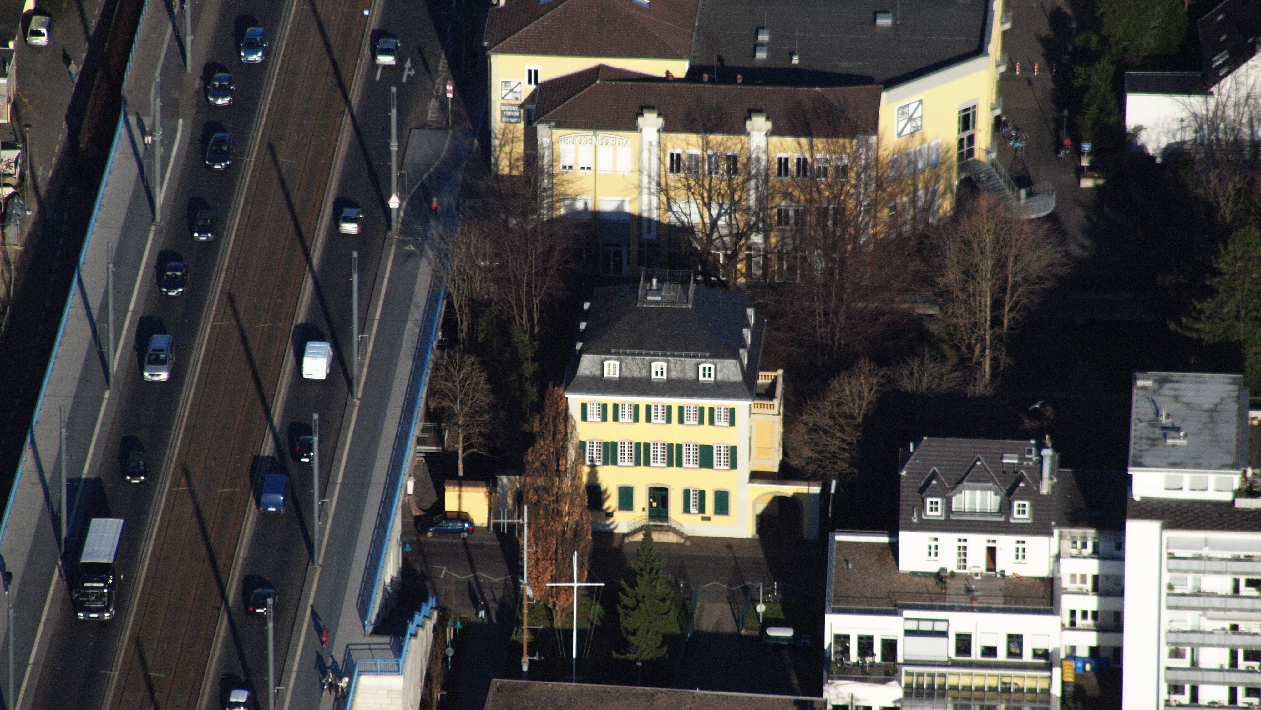 Mehlem’sches Haus, Rheinaustraße 131, Bonn-Beuel: Luftaufnahme; links die Kennedybrücke